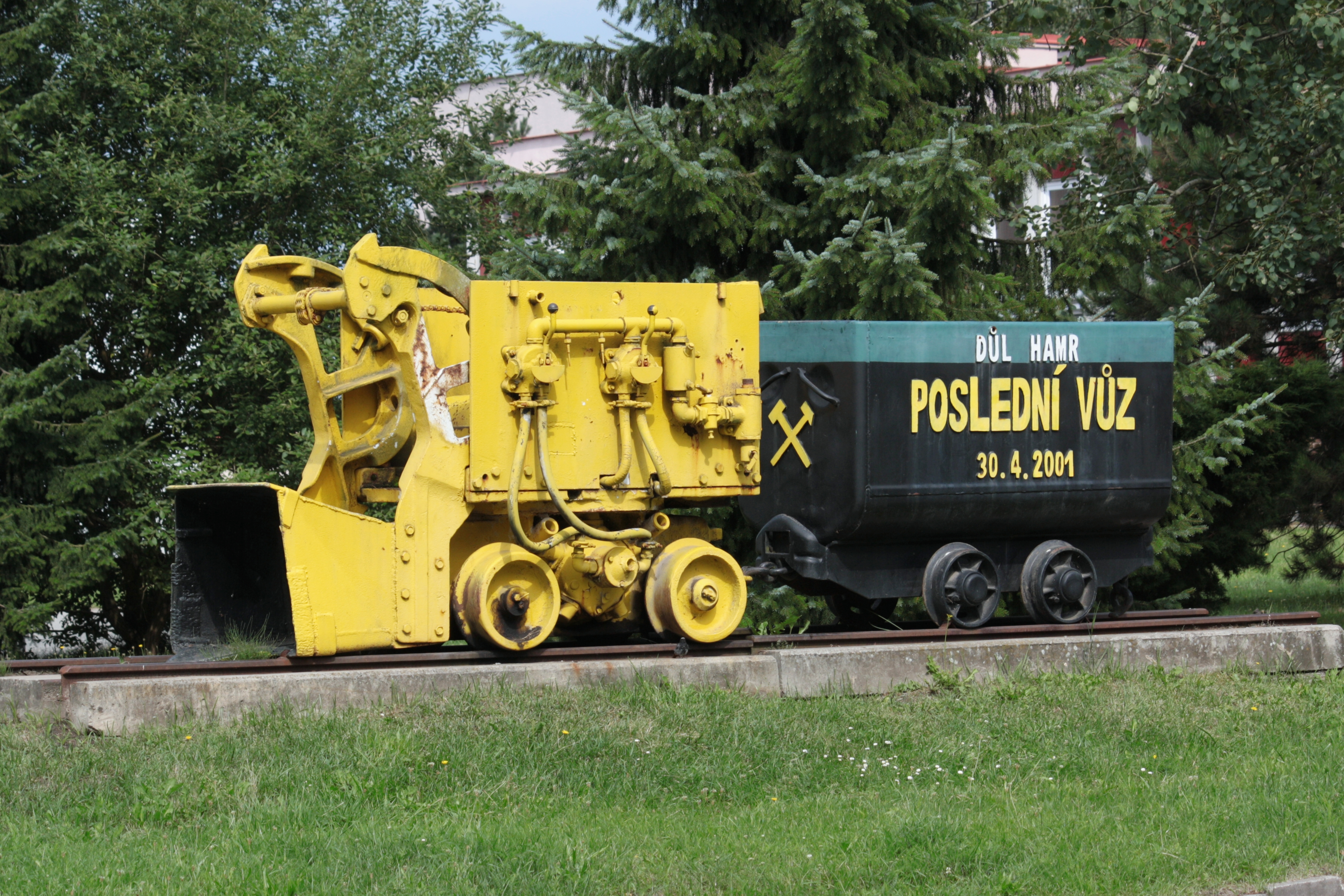 PPN-1S; Stráž pod Ralskem, důlní vláček